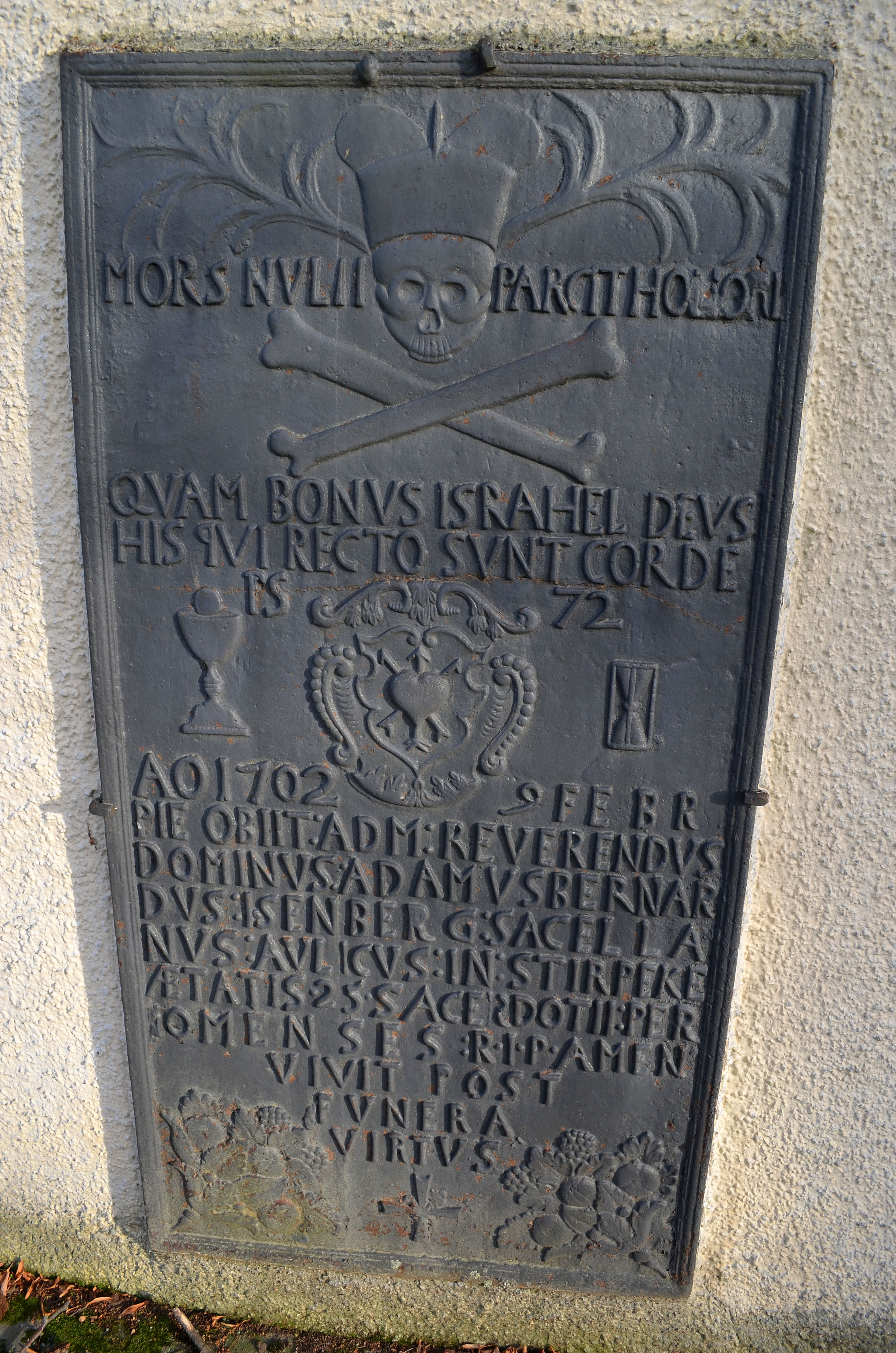 Nehden, Johanneskapelle Grabplatte an der Außenwand